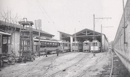 Ancona - Deposito tram via Nazionale